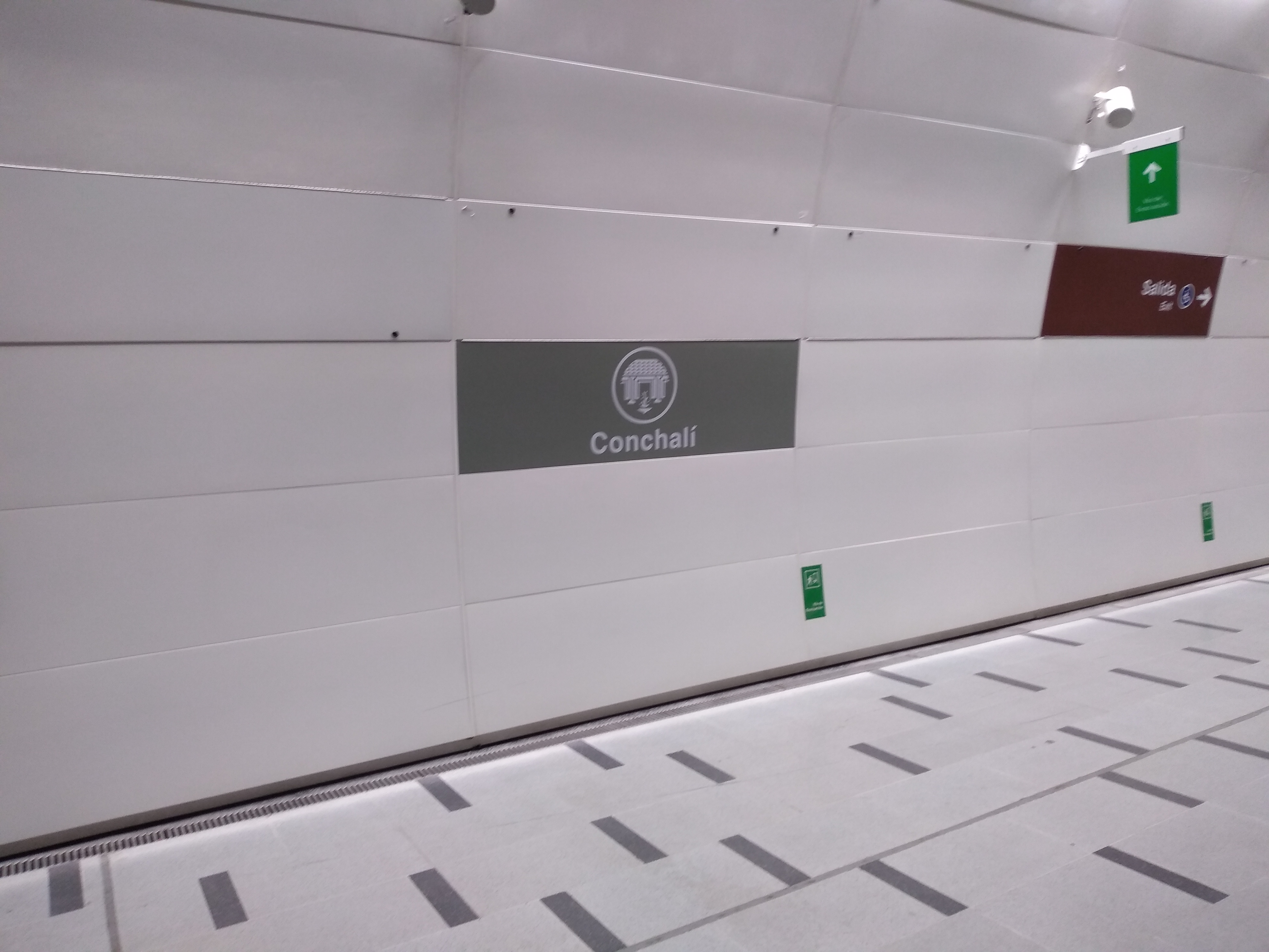 Estación Conchalí